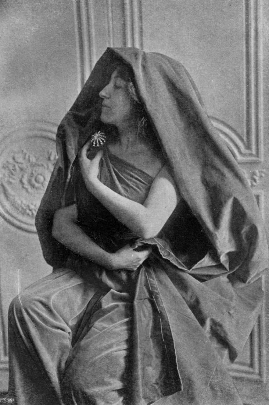 Monna Vanna im Schauspiel von Maurice Maeterlinck dargestellt von Georgette Leblanc (1902)